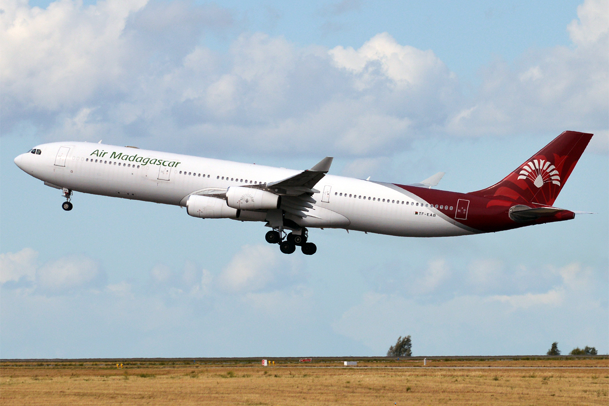 Air Madagascar, TF-EAB, Airbus A340-313